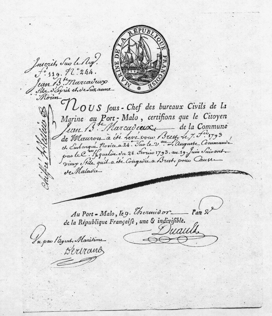 Attestation de sortie du service dans la Marine pour maladie, délivrée à Saint Malo en thermidor An II, pour un marin de Mauron. Longueur du document : 20 cm.